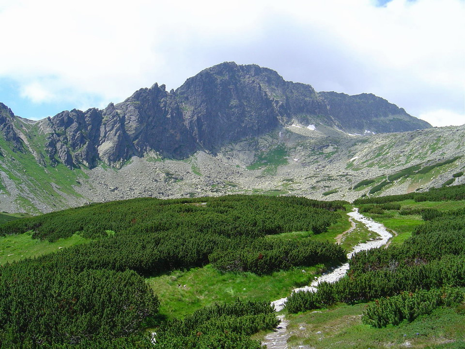 Furkotska dolina